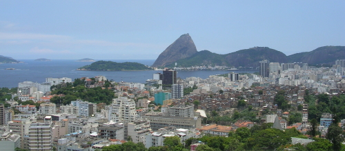 Vista desde el Parque das Ruínas, barrio de Santa Teresa, Rio de Janeiro, Brasil